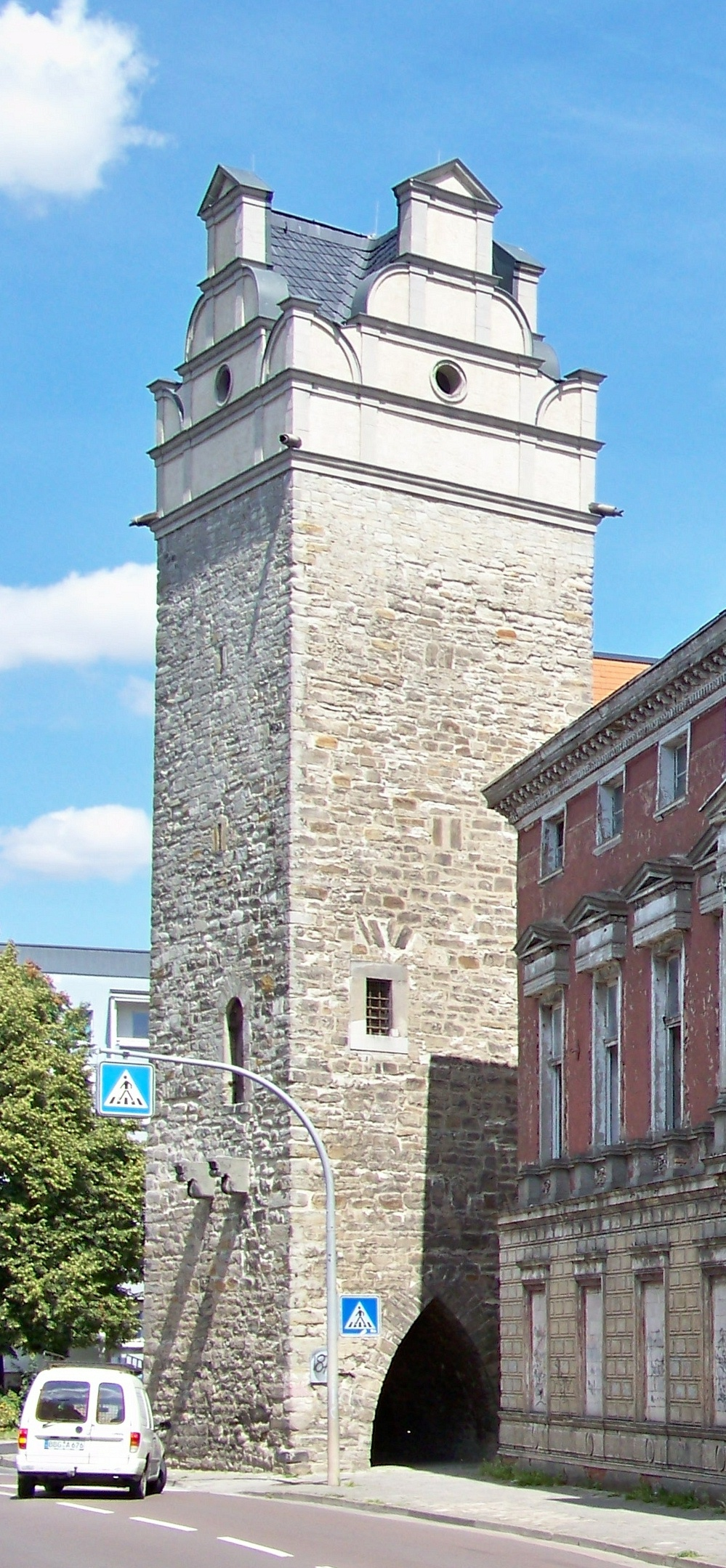 Nienburger Tor in Bernburg (Saale)